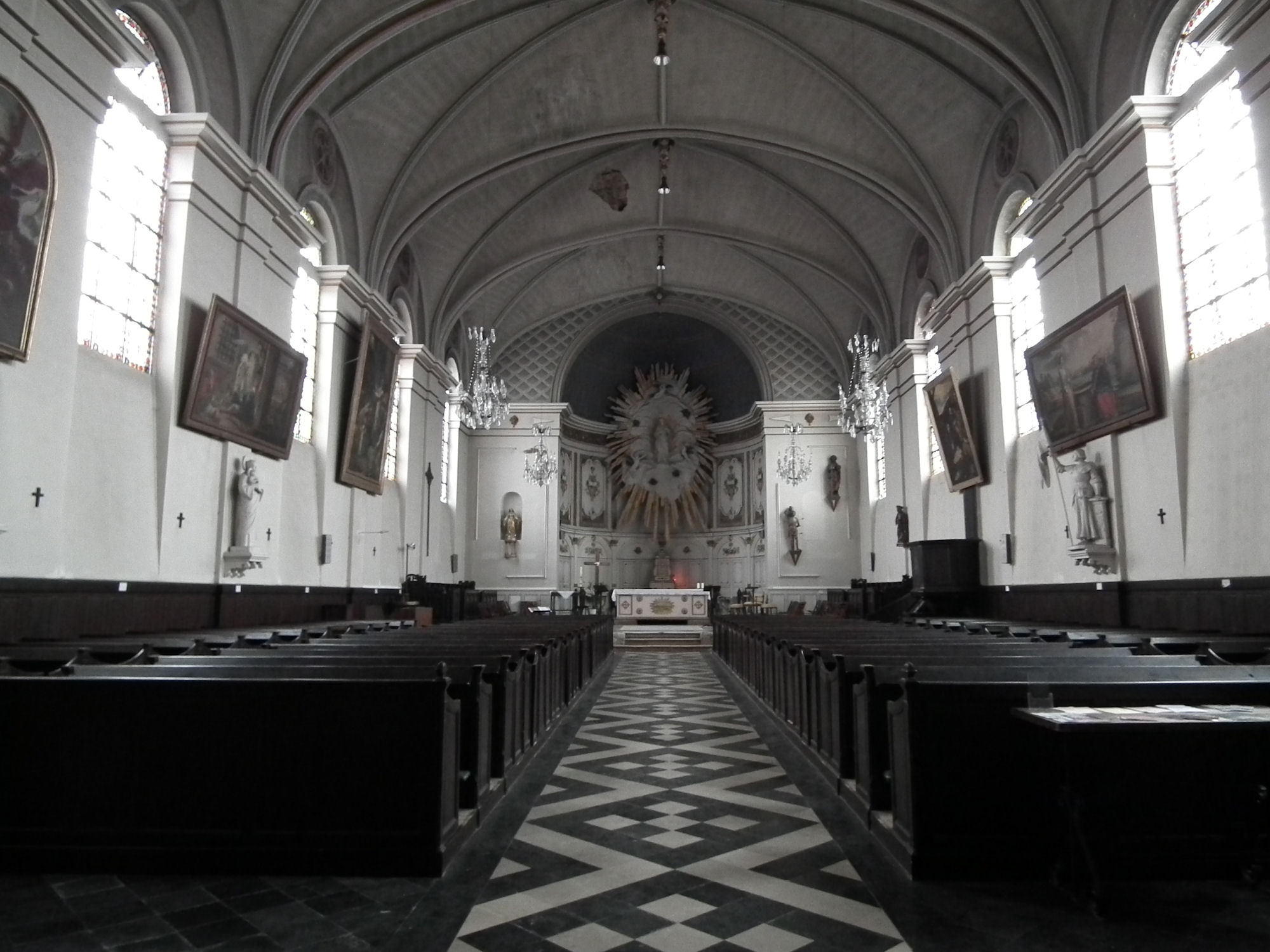 Église Saint-Wulphy, Rue, France